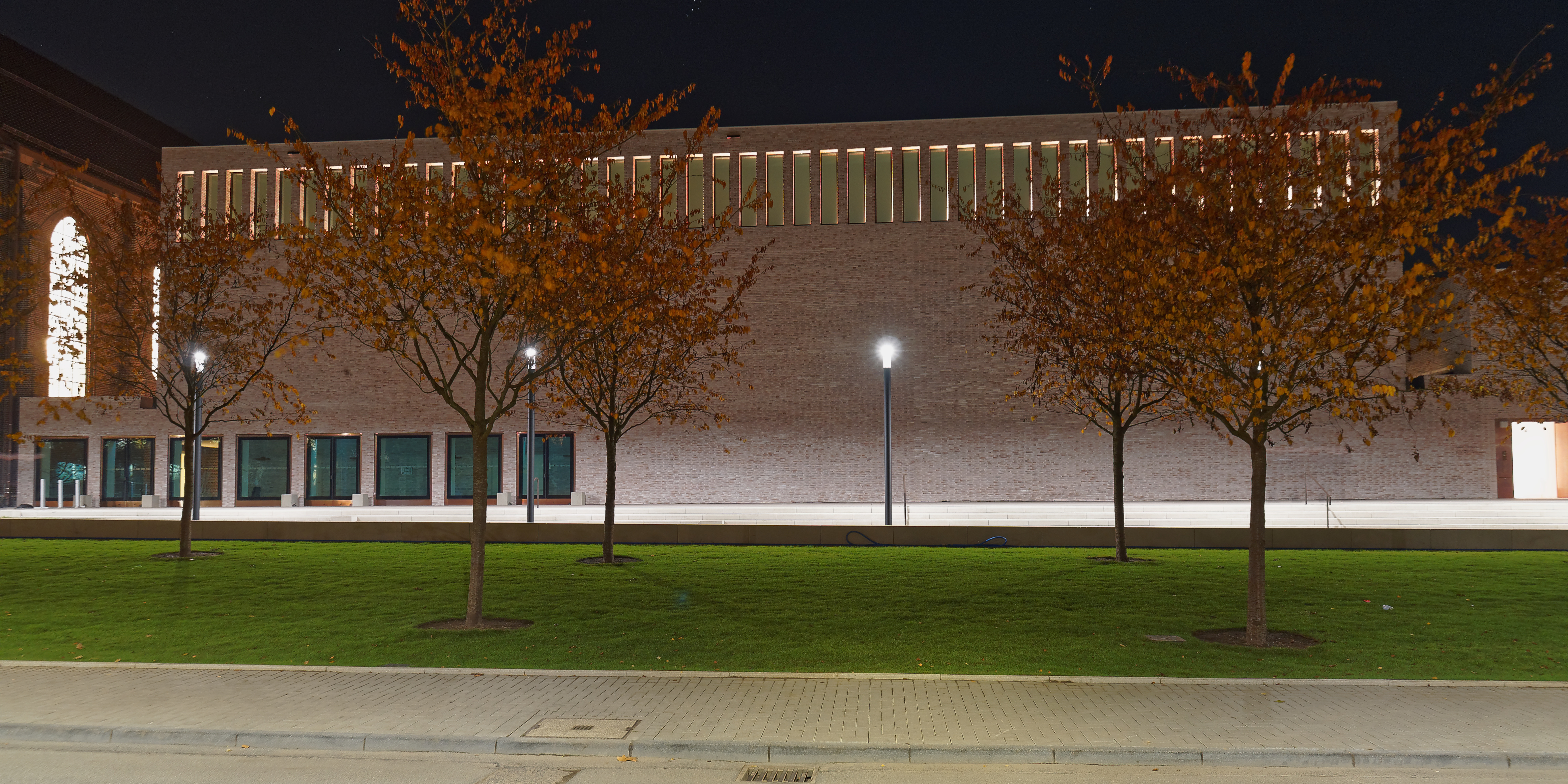 Anneliese Brost Musikforum Ruhr in Bochum, Westseite des großen Saales